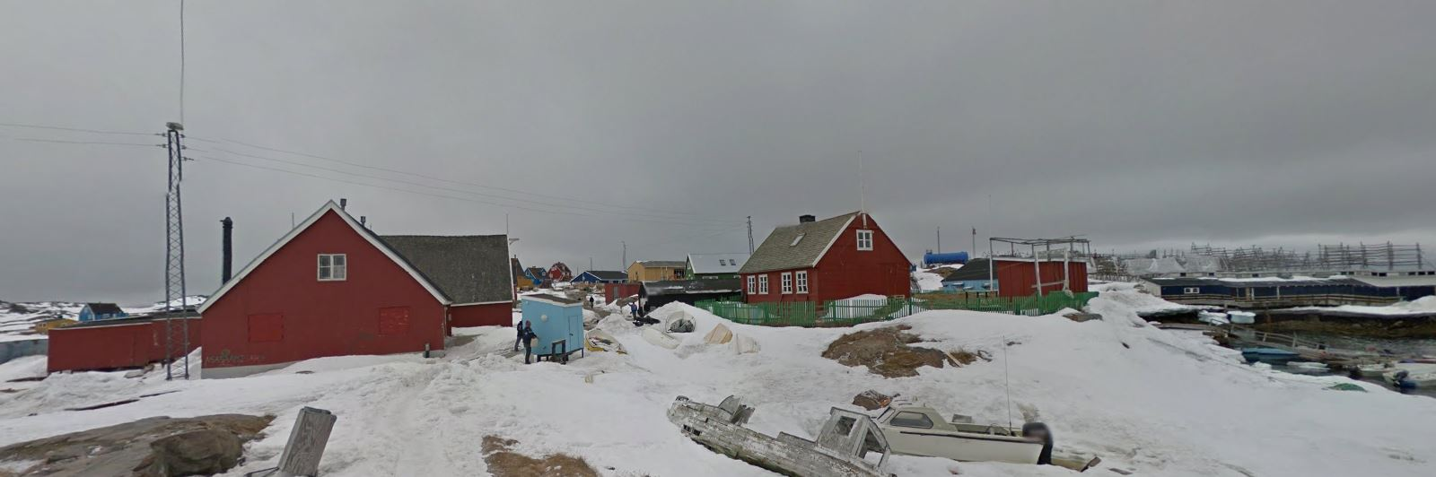 Attu.